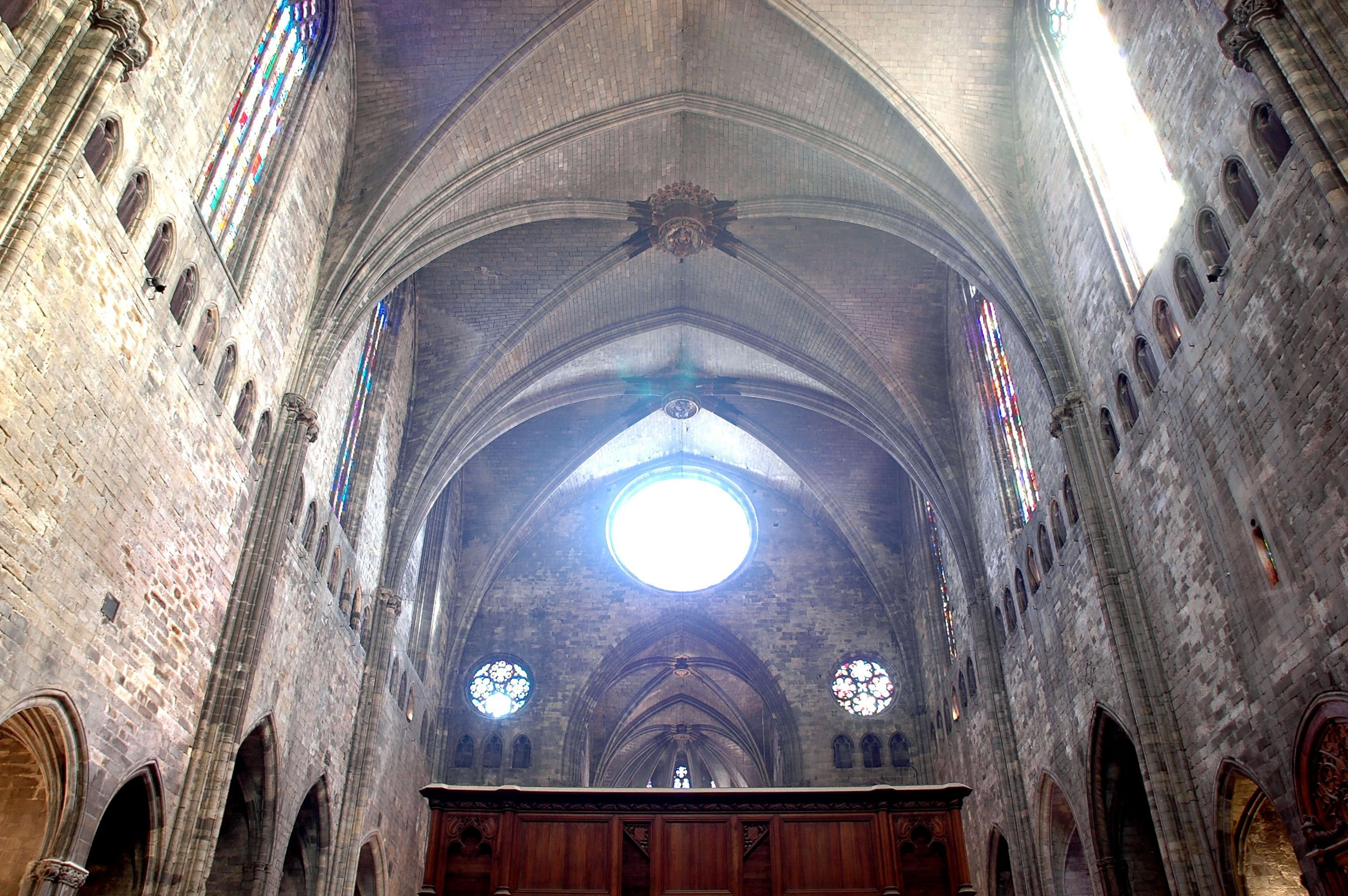 Catedral de Girona - Nau central des de darrera orgue